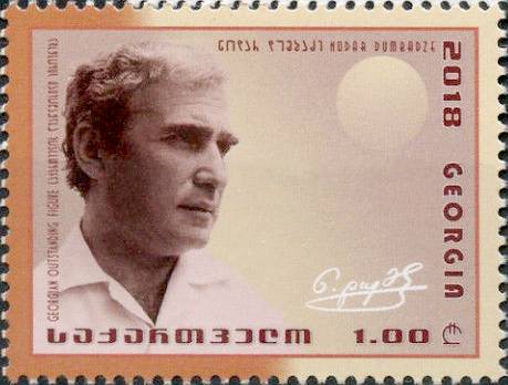 Nodar Dumbadze